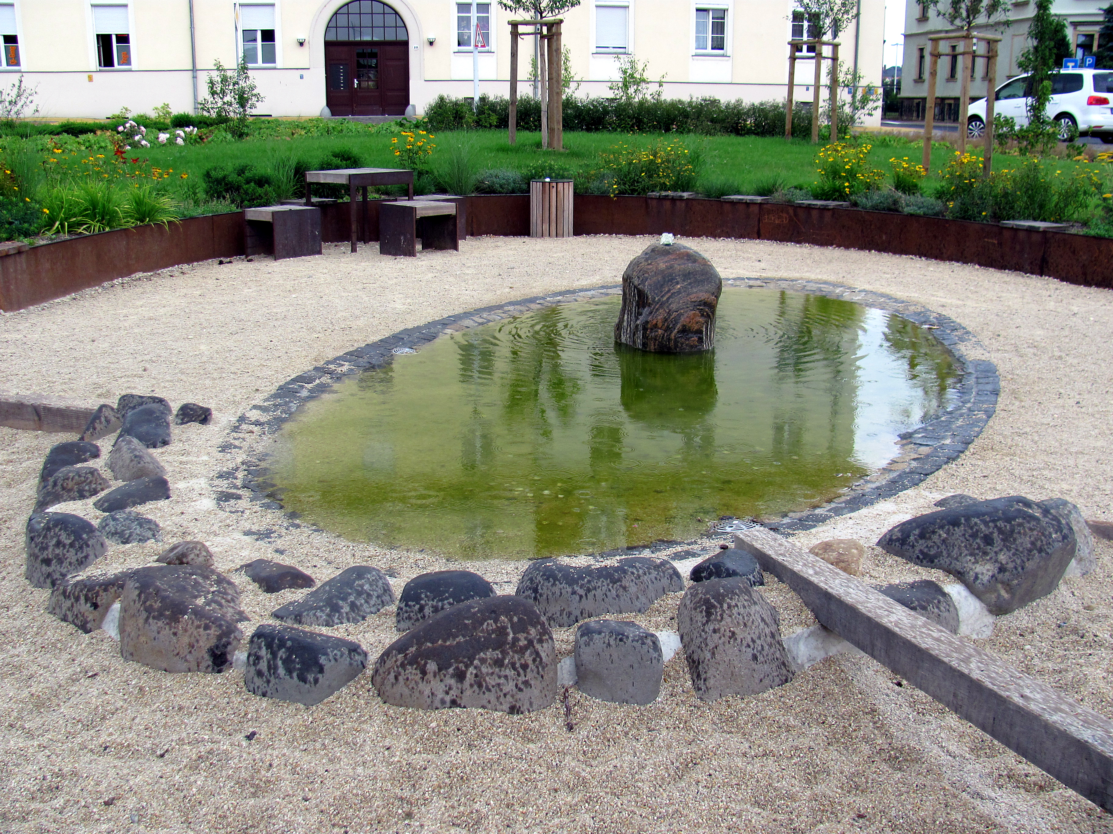 Alt-Radebeul, Sprudelstein auf dem Robert-Werner-Platz